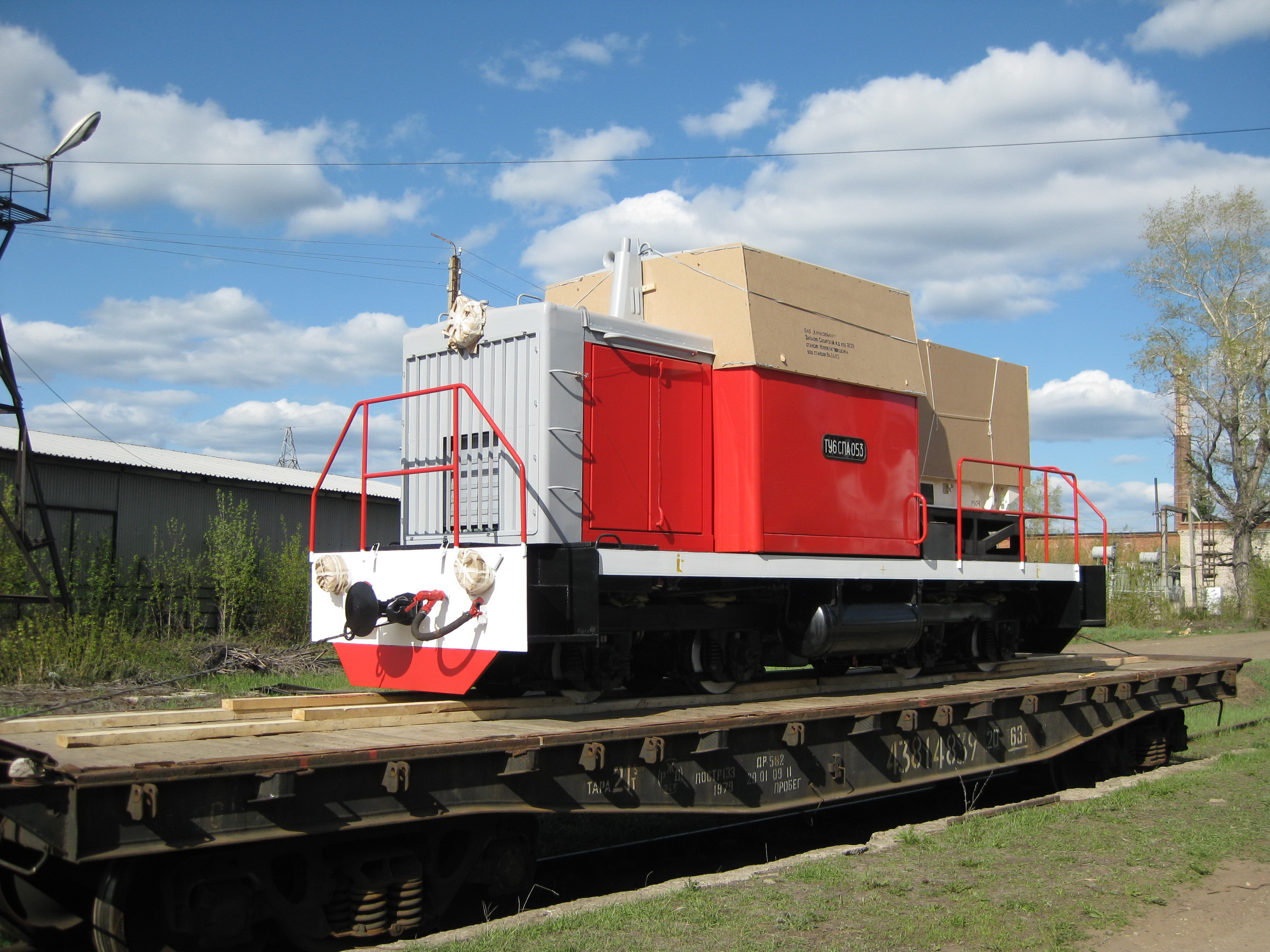 Тепловоз ТУ6СПА (Строительно-ремонтный поезд)